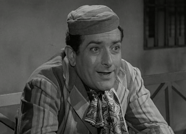 Riccardo Garrone in a scene of the film I due pericoli pubblici